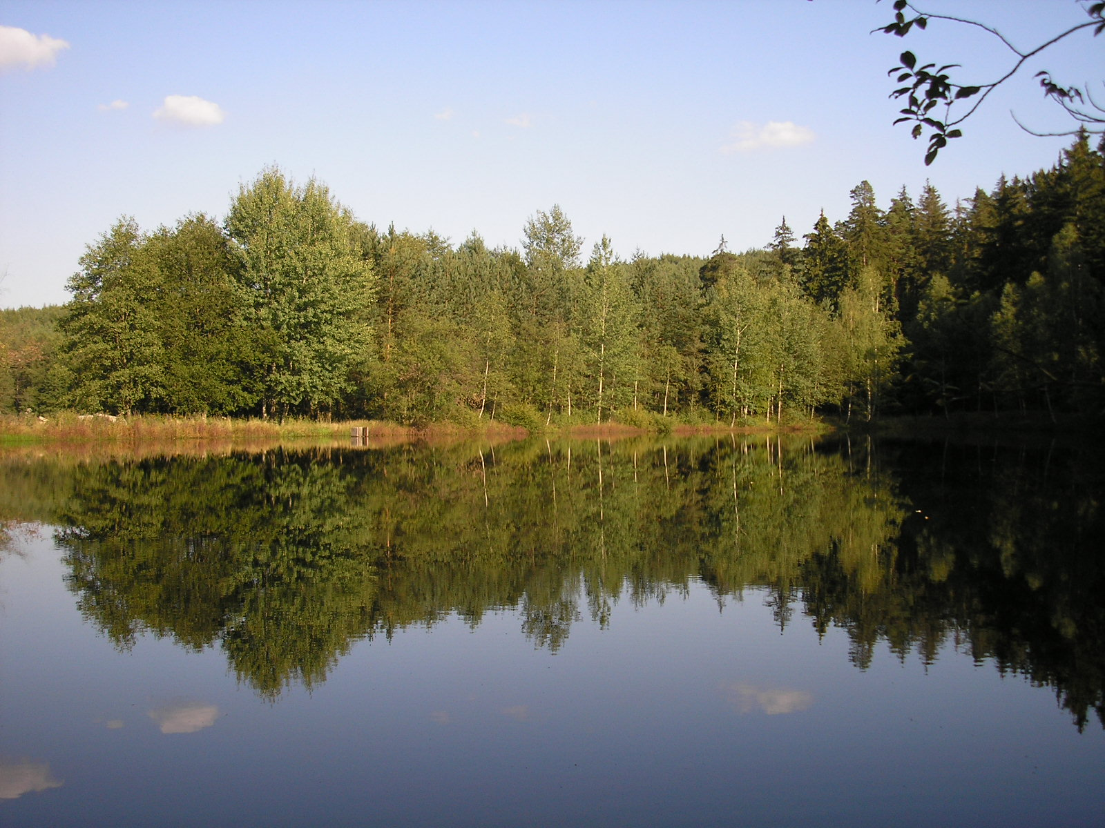 Der kleine Streichteich bei Ilmenau (Thüringen, Deutschland).